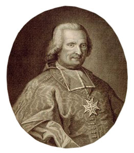 Christophe de Beaumont, évêque de Paris